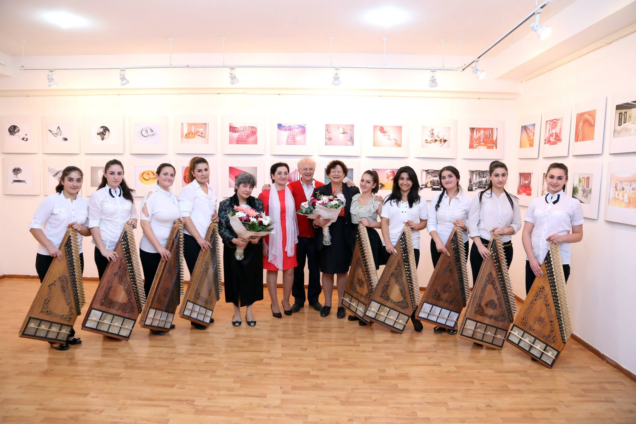 Նարեկացի արվեստի կենտրոն, Ծովինար Հովհաննիսյանն իր կոլեգաների և սաների հետ